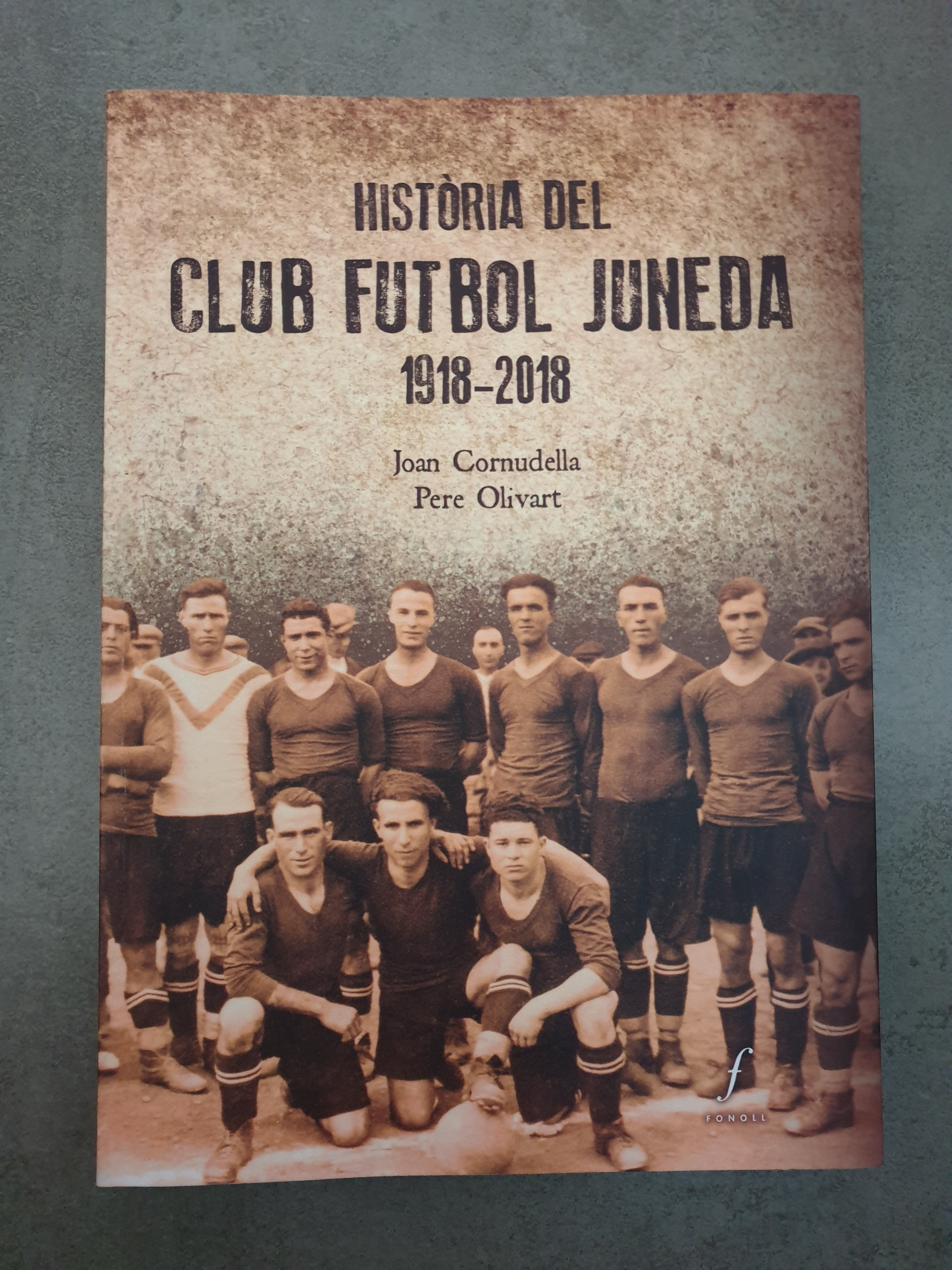 Llibre_Historia_del_CF_Juneda_1918-2018